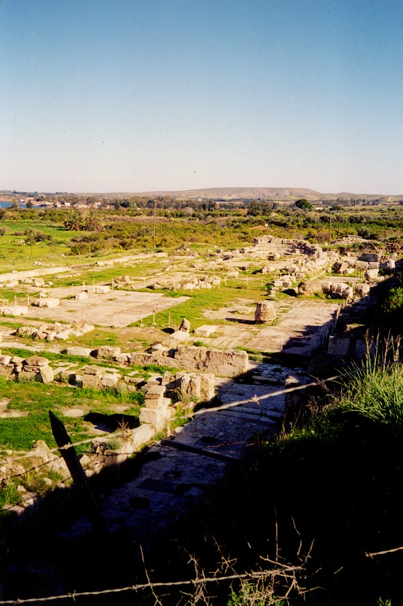 Ruinas de Soli. Chipre. Imagen tomada por el cargador. Año 1998.